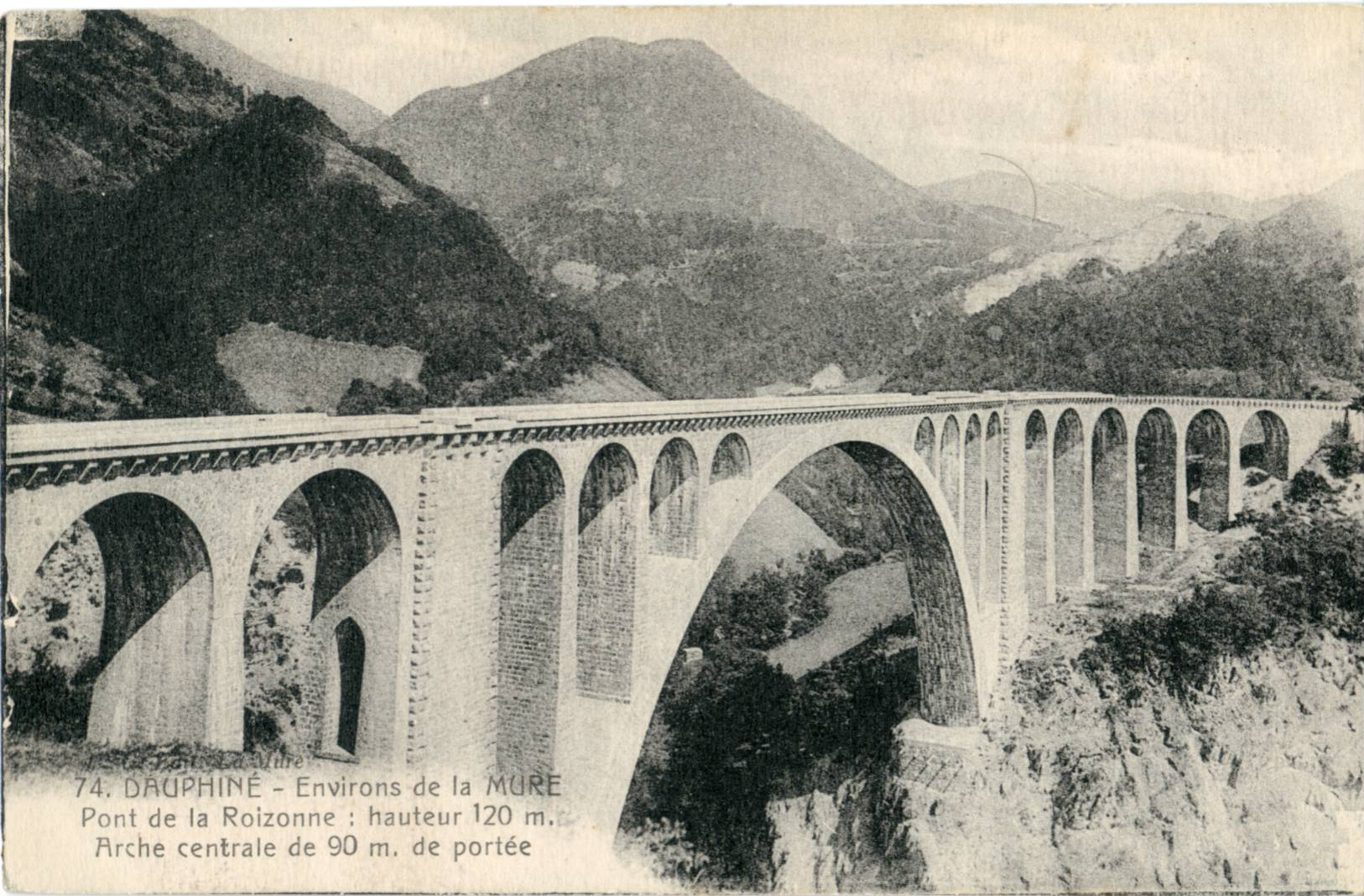 Carte postale ancienne, sans mention d'éditeur, n° 74 : DAUPHINÉ - Environs de La Mure - Pont de la Roizonne (hauteur 120 m, arche centrale de 90 m. de portée)